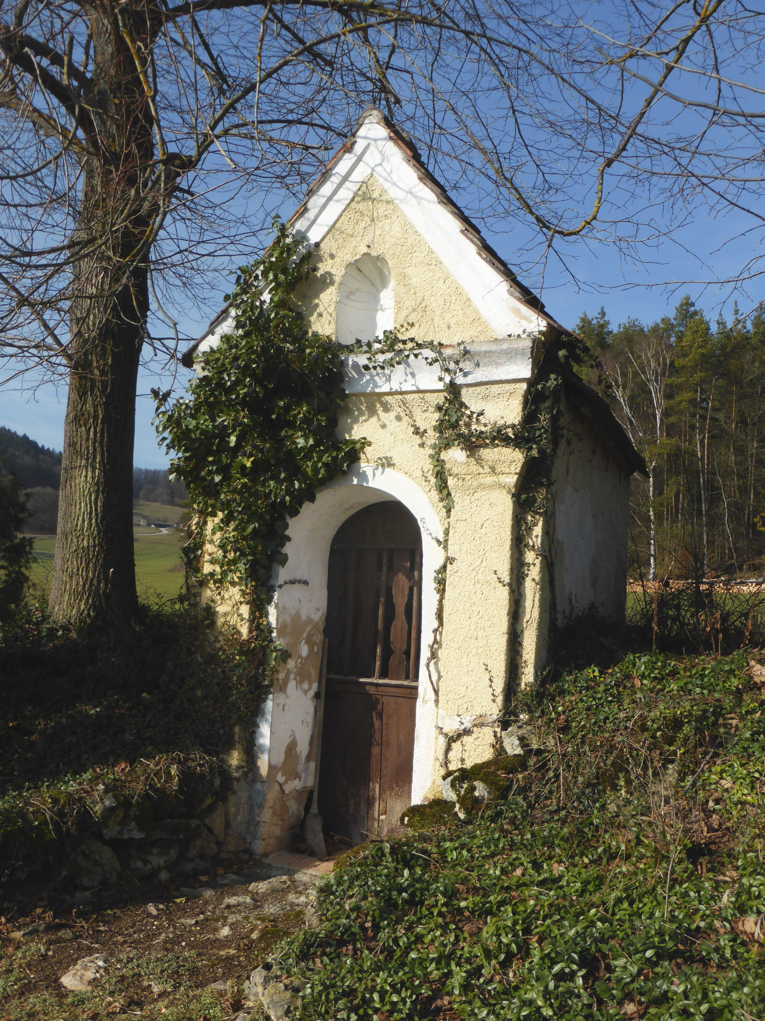 Wegkapelle in Pillmannsricht (Hohenfels)